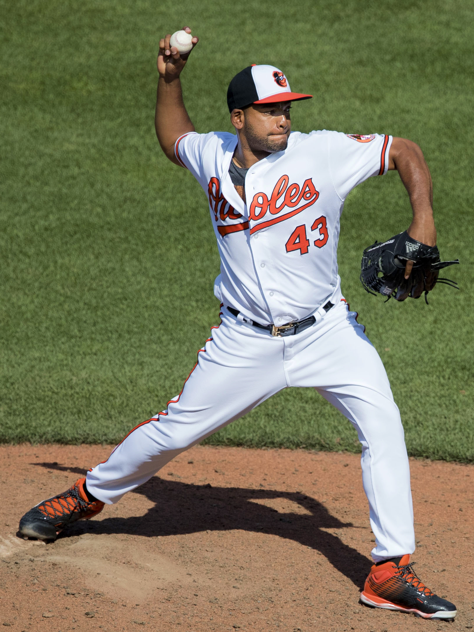 Odrisamer Despaigne